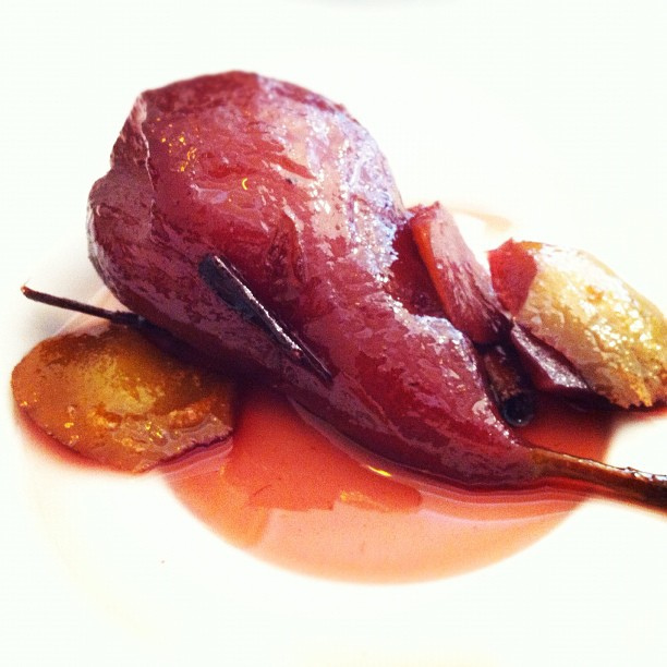 Peras al vino.